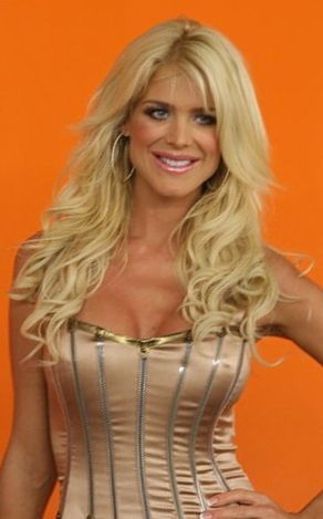 Photo de Victoria sylvstedt lors du Top Model Belgium 2007